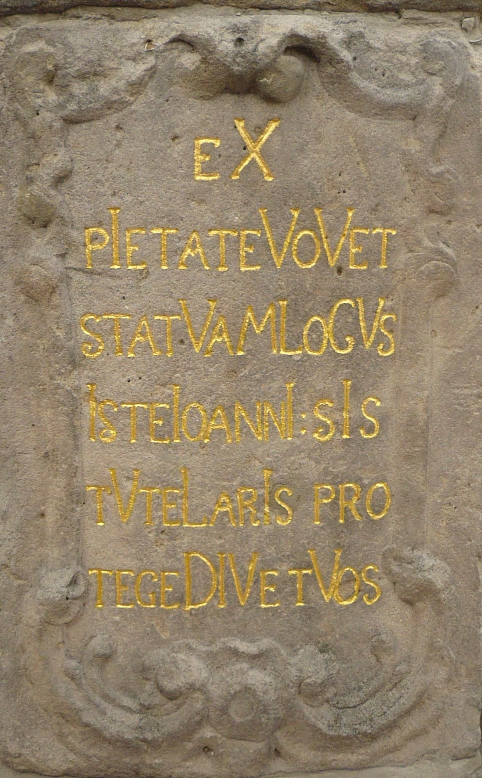 Sockel der Johannes-Nepomuk-Statue in der Schuhmacherstrasse (ul. Piastów ) in Neurode (Nowa Ruda), ehemalige Grafschaft Glatz, Niederschlesien, Polen.